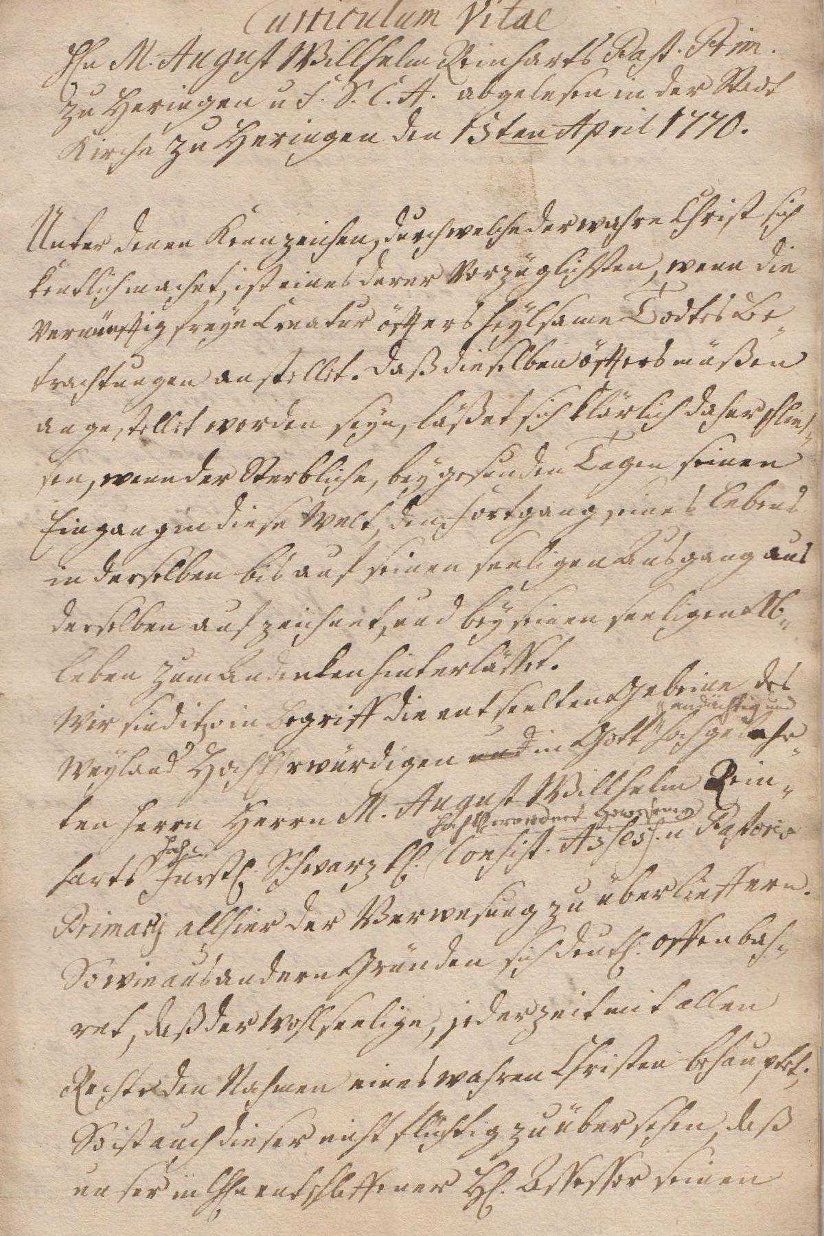 Seite 1 der Leichenpredigt für den Pastor August Wilhelm Reinhart (1696/1770), Bürger der Stadt Heringen an der Helme.